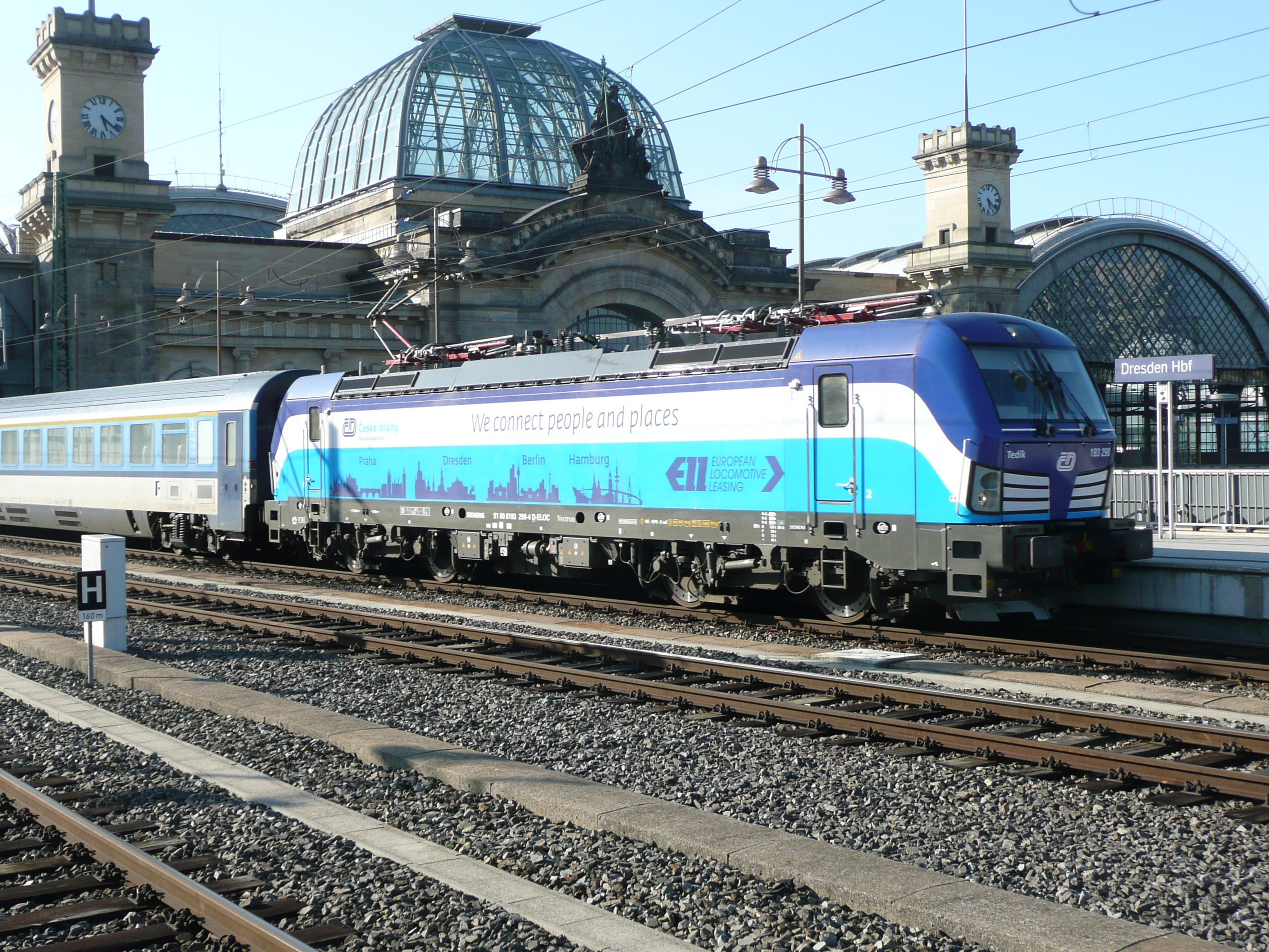 193 290 im Bahnhof Dresden Hbf vor EC Richtung Prag